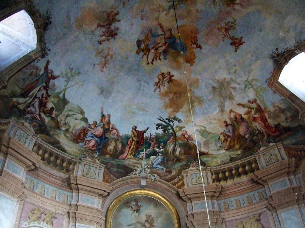 Eisenstadt, Haydnkirche - dome